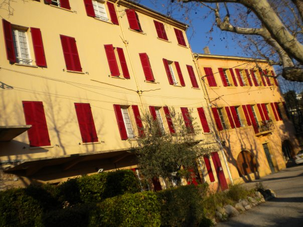 Séminaire de la Faculté